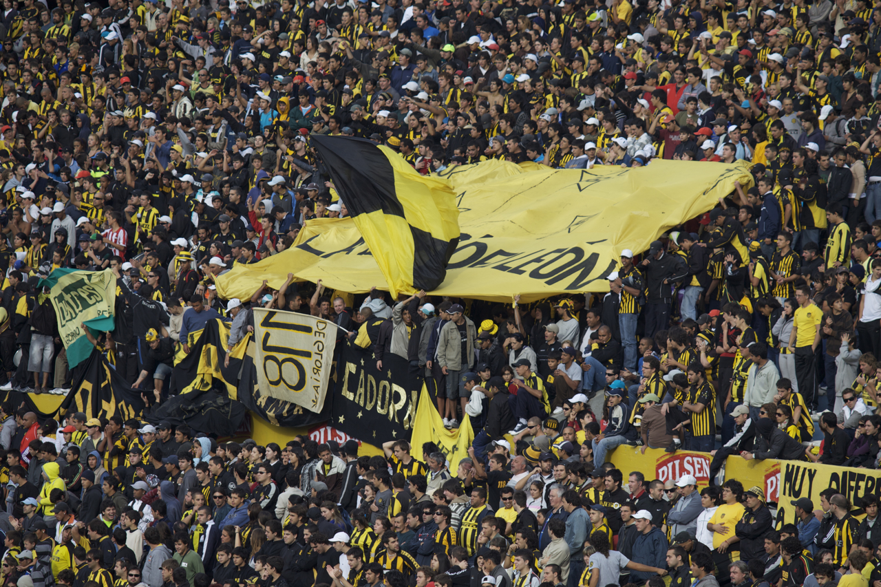 Hinchas de Peñarol en el Estadio Centenario de Montevideo